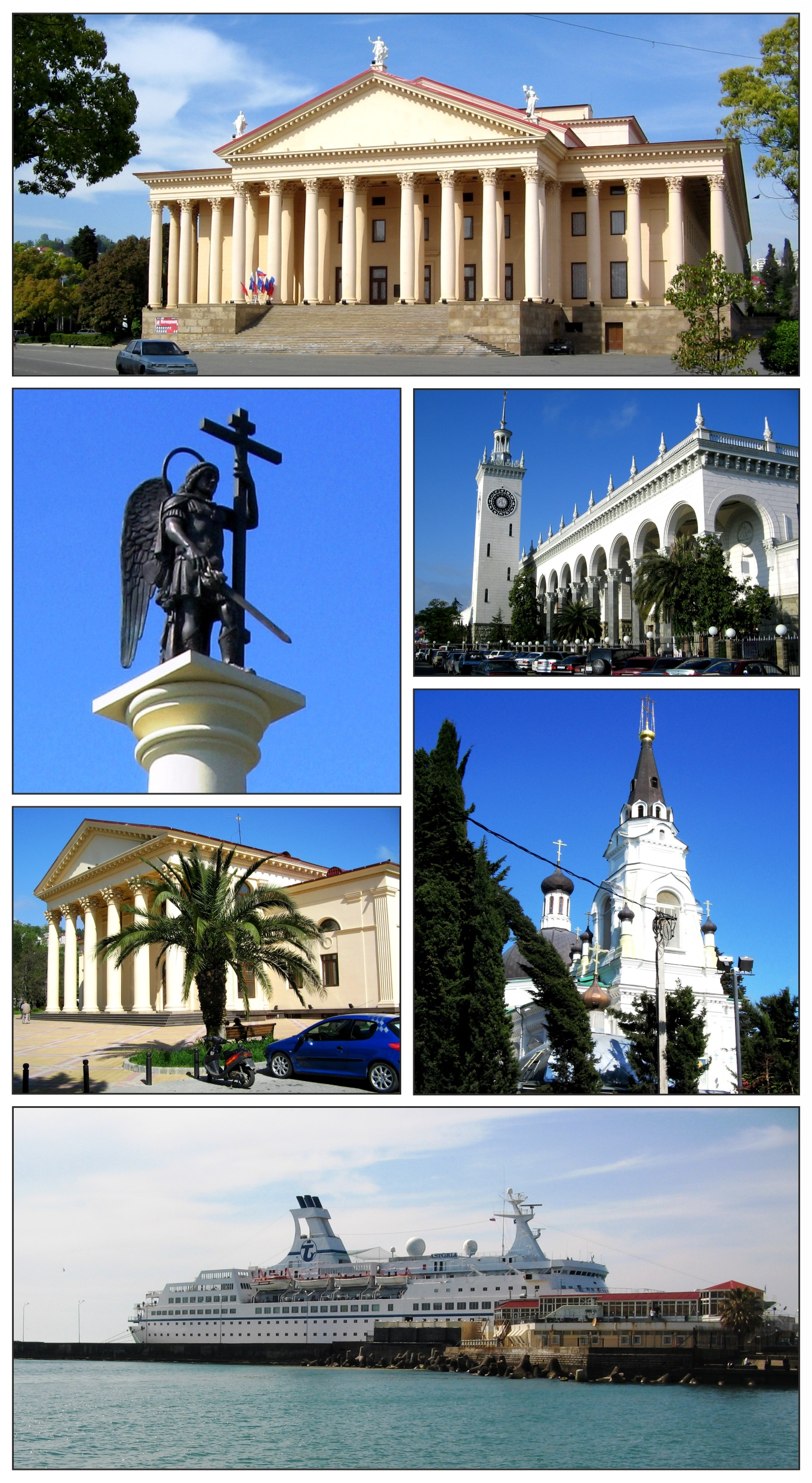 Коллаж из фотографий собственной съёмки.